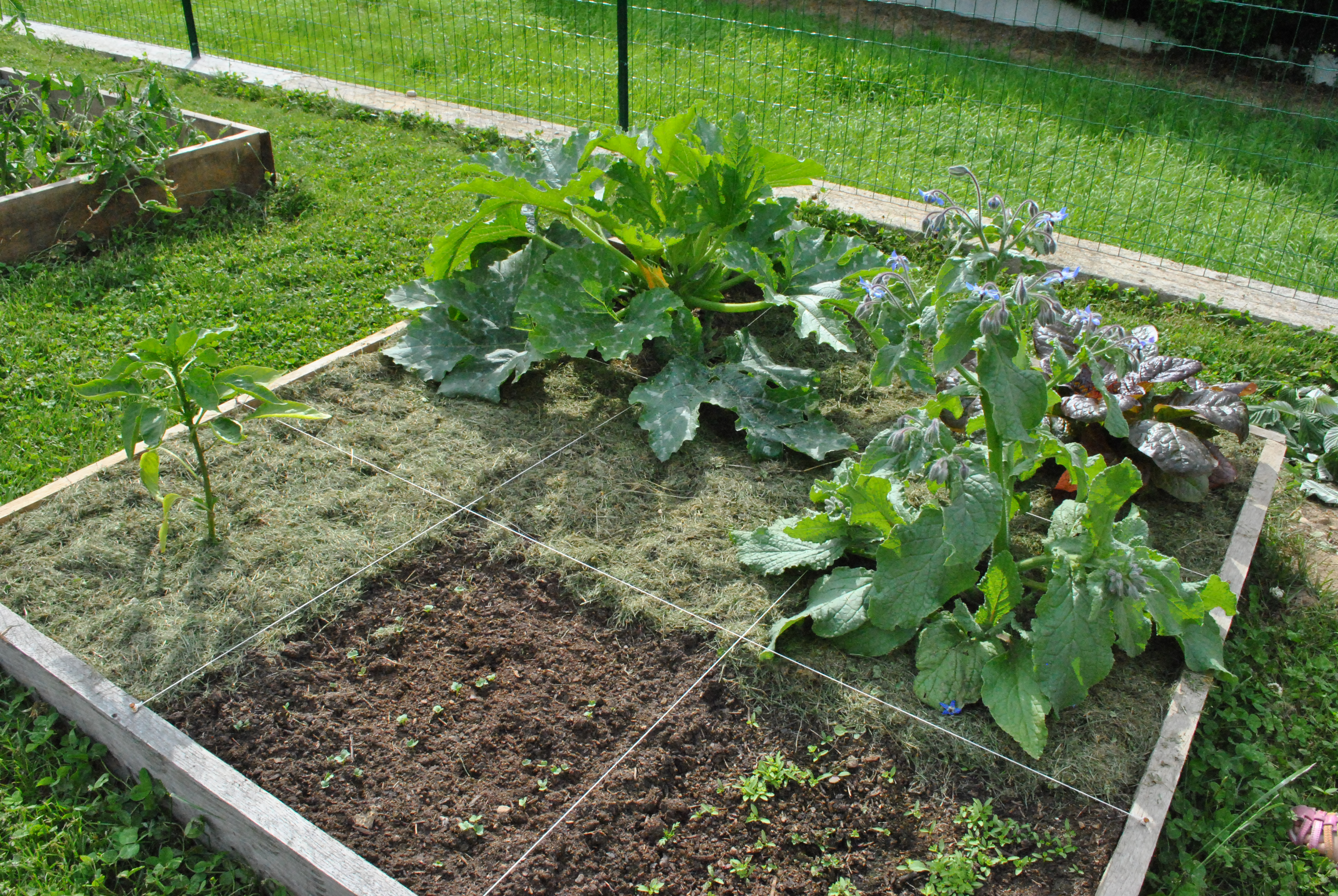 Jardin en carrés selon la méthode française : planche de cultures 1,2m x 1,2m et carrés de 40 cm x 40 cm